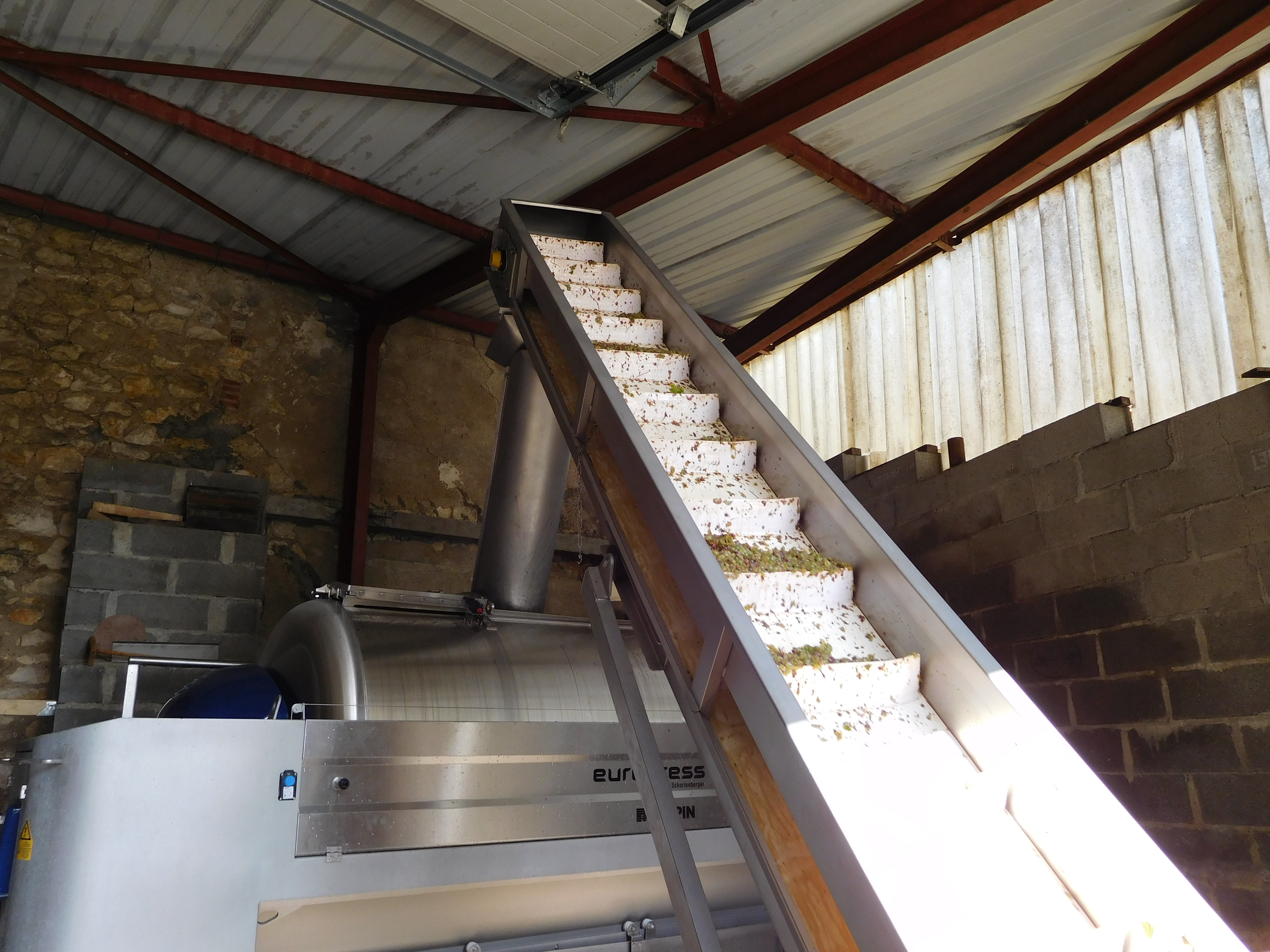 Chargement d'une récolte de raisins dans un pressoir pneumatique, au village vigneron des Loges, Pouilly-sur-Loire (Nièvre, France).